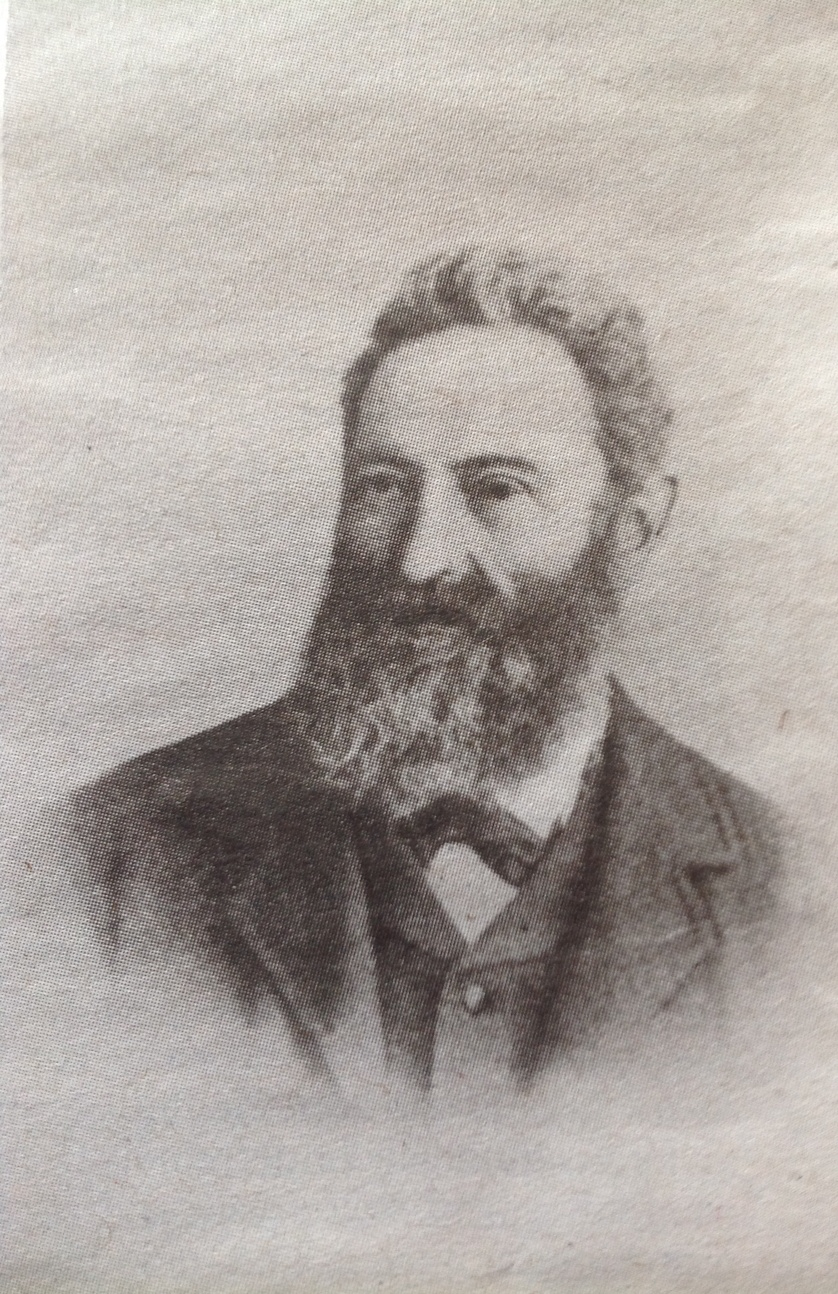 Der rätoromanische Schriftsteller Giovannes Mathis (1824-1912)